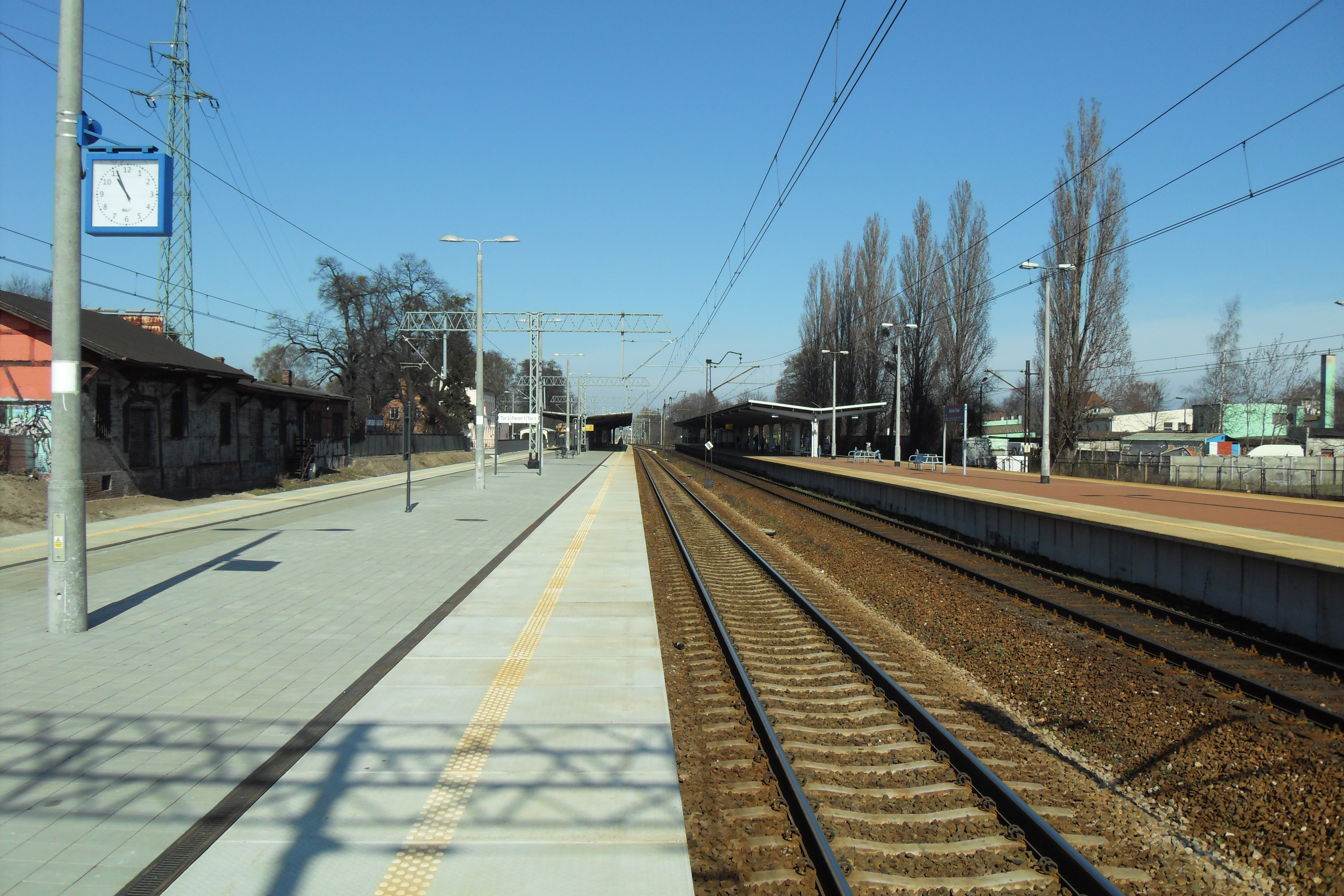 Stacja kolejowa Gdańsk Oliwa.